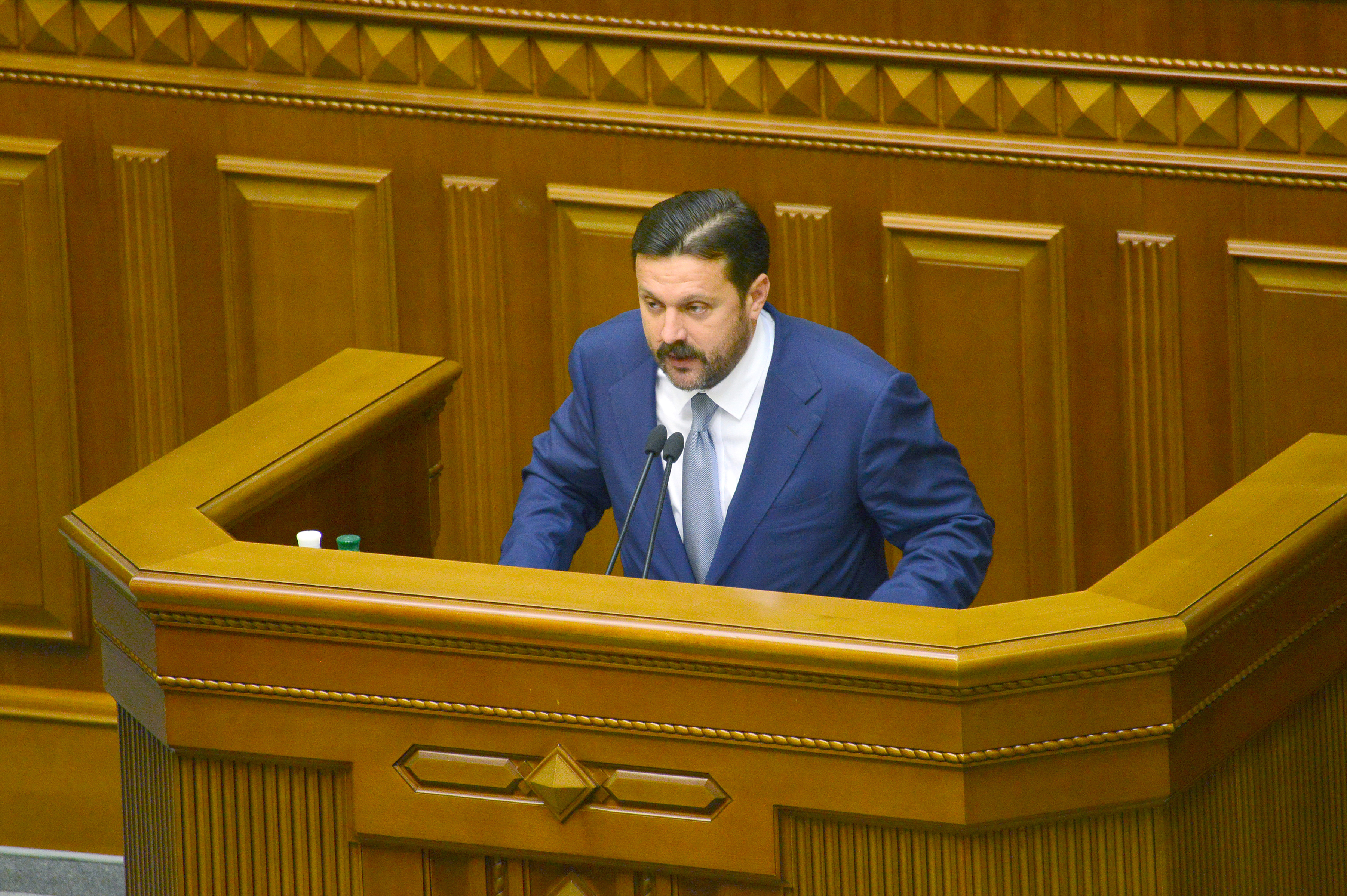 ВЕРХОВНА РАДА УКРАЇНИ 2013